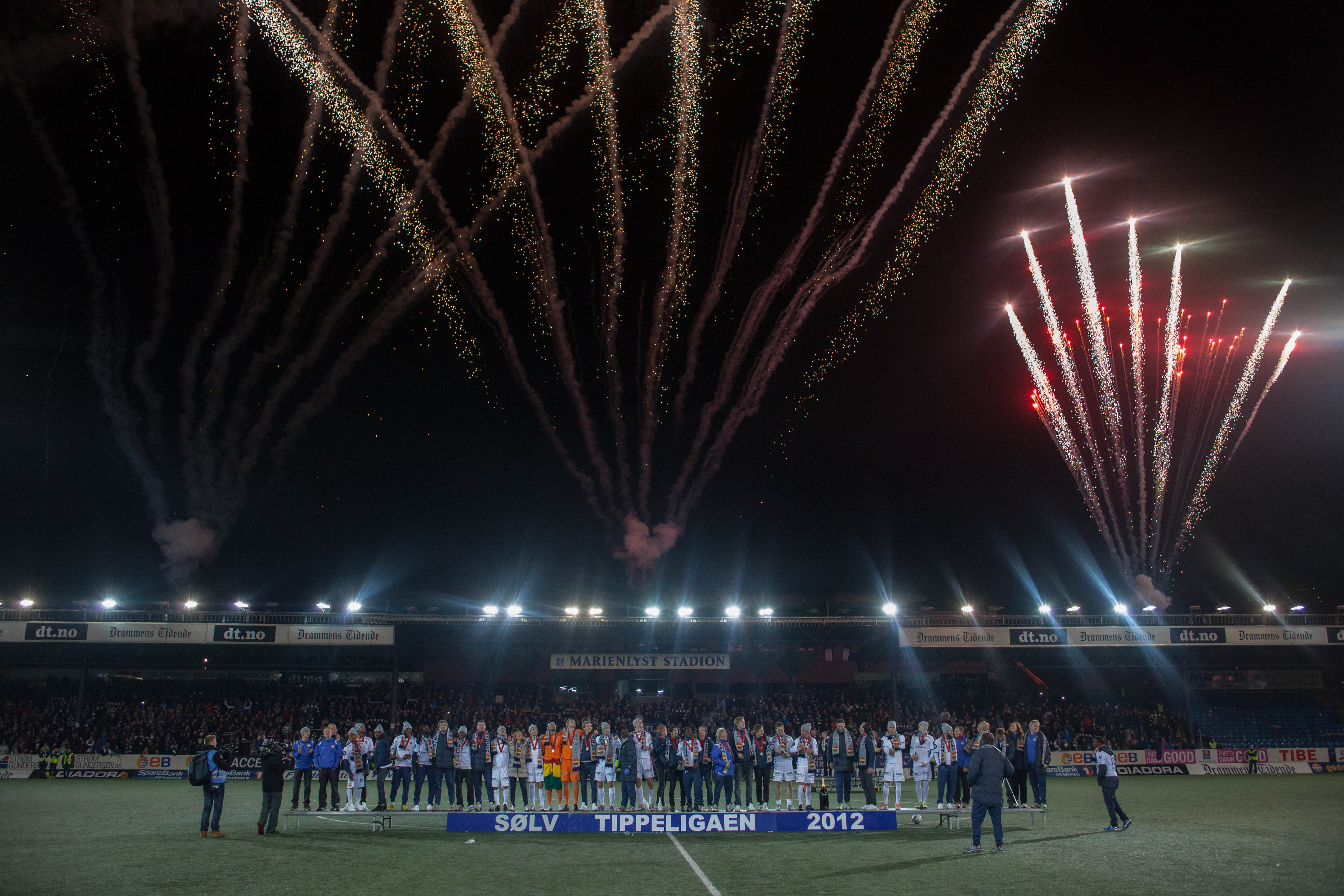 Fyrverkeri over marienlyst